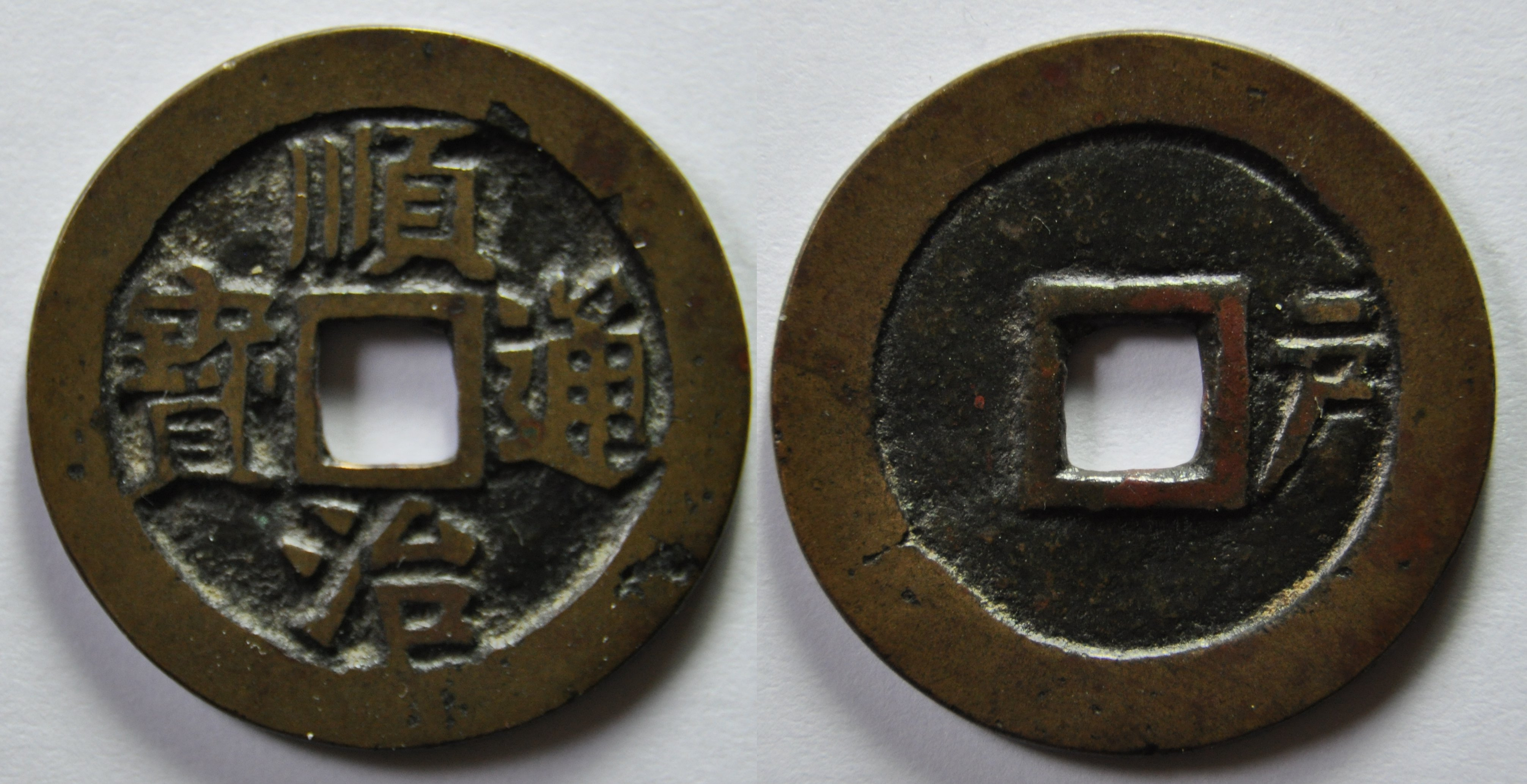 Une monnaie en laiton d'une sapèque (1 cash) de l'empereur Shi Zu (1644-1661), ère Shun Zhi de la dynastie Qing (1644-1912). La monnaie se lit en croix. A/ Shun Zhi tong bao (Monnaie courante de Shun Zhi) R/ Hu à droite pour Hu bu, le ministère des finances à Pékin Dimension : 26,47 mm Poids : 4,8 g. Remarque : En 1644, les monnaies au nom de l'empereur sont fabriquées à un poids de 1 qian (environ 3,7 g.) dans seulement deux ateliers mais sans marque d'atelier. En 1645, le poids passe à 1,2 qian (environ 4,4 g.) avec marque d'atelier par un caractère chinois au revers à droite. En 1651, le poids passe à 1,25 qian (ca 4,6 g.) toujours avec un caractère chinois au revers mais en haut. Cette monnaie correspond à la période 1645-1651 suivant le type mais à la période 1651-1653 pour le poids de 1,25 qian. Référence : H22.19 Indice de rareté : 11, commune d'après D.Hartill.